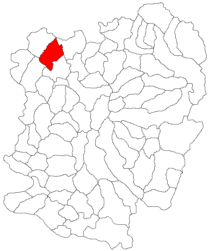 Categorie:Hărţi ale judeţului Caraş-Severin